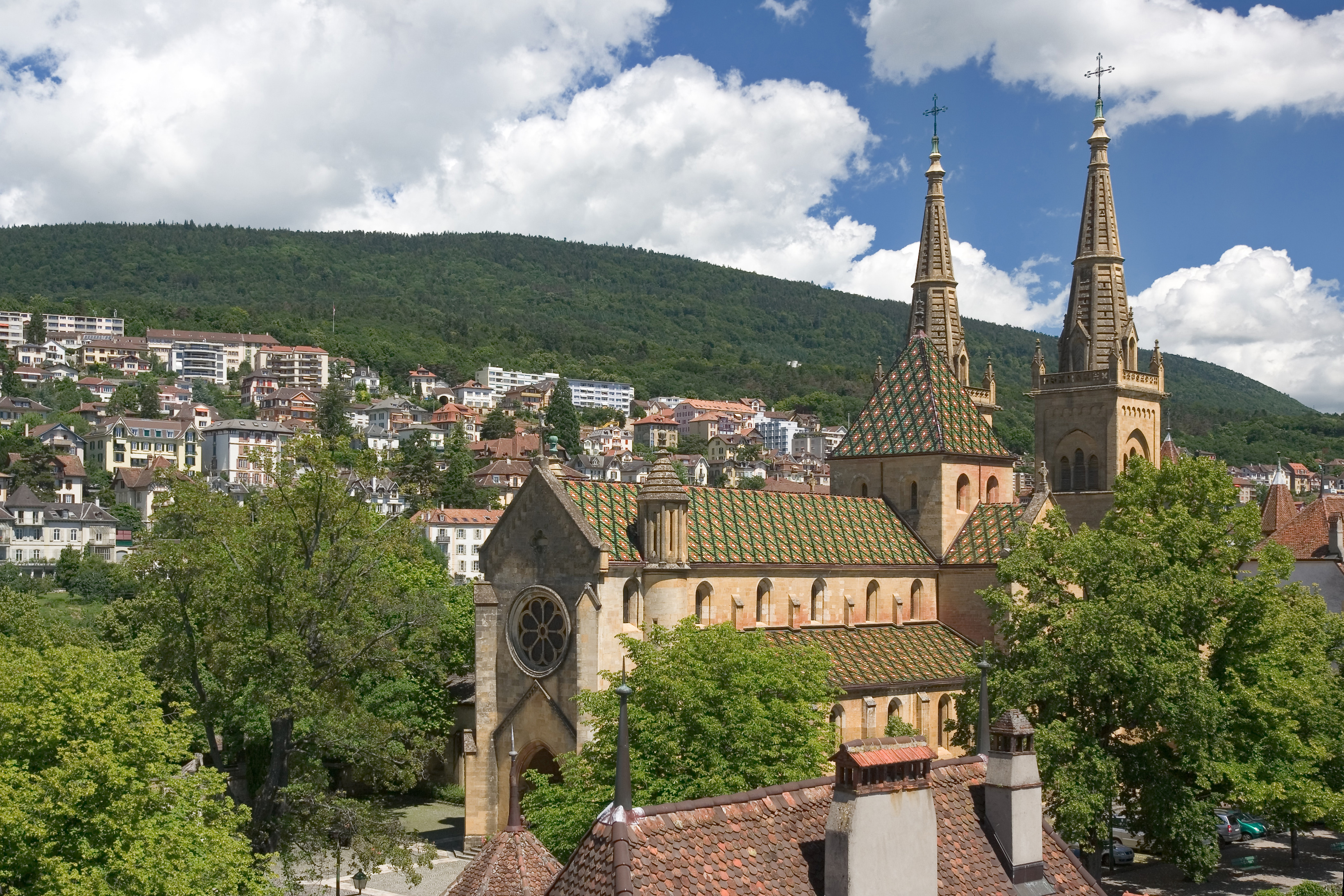 Die Kollegiatskirche Neuenburg vom ehemaligen Gefängnisturm aus gesehen.